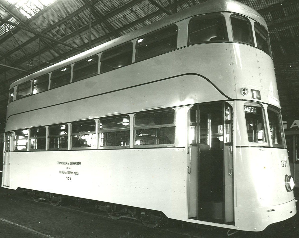 Tranvía de doble piso argentino